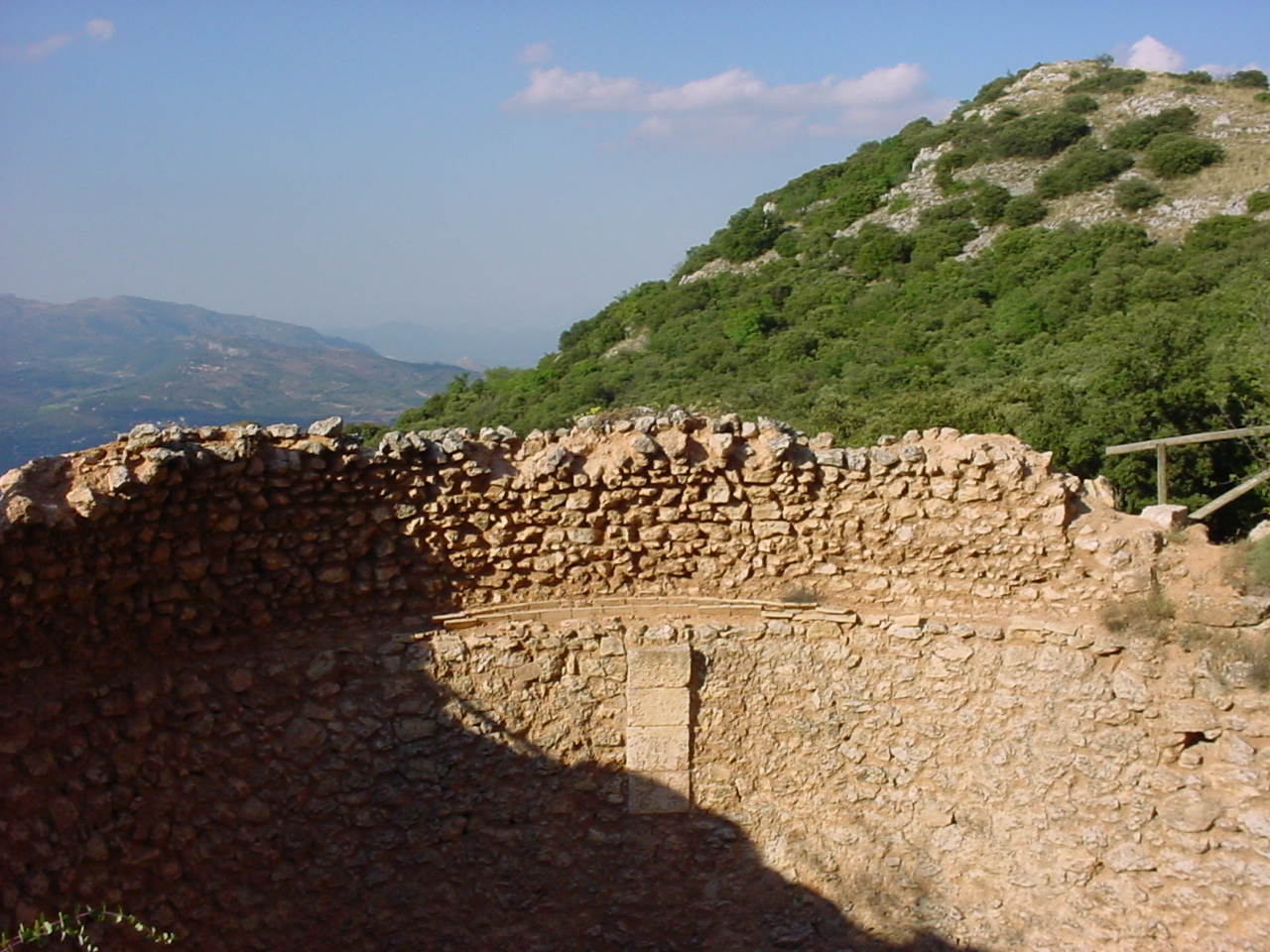 Cava Coloma, al Parc Natural del Carrascar de la Font Roja (Alcoià, País Valencià)